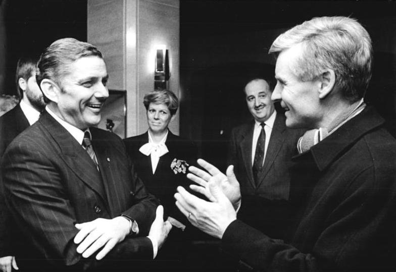 ADN-ZB-Häßler-1.11.89-mx-Dresden: Treffen- Im Rahmen eines Gesprächs zu Umweltfragen zwischen Vertretern aus Dresden und Hamburg kam es zu einer Begegnung der Bürgermeister beider Städte. L.: Dresdens Oberbürgermeister Wolfgang Berghofer und Dr. Henning Voscherau, 1. Bürgermeister der Freien und Hansestadt Hamburg.